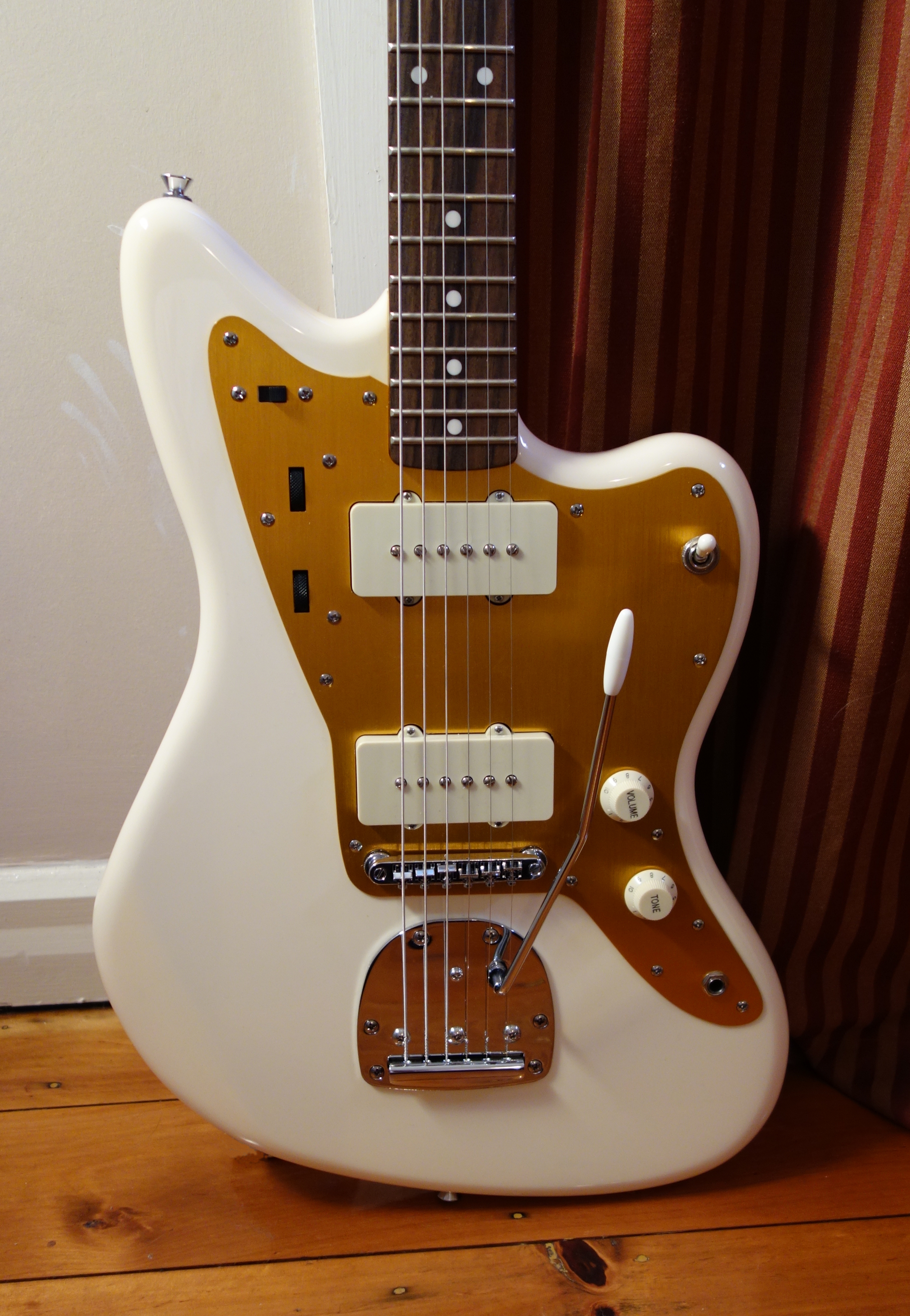 Squier J Mascis Jazzmaster - Squier by Fender Artist Series